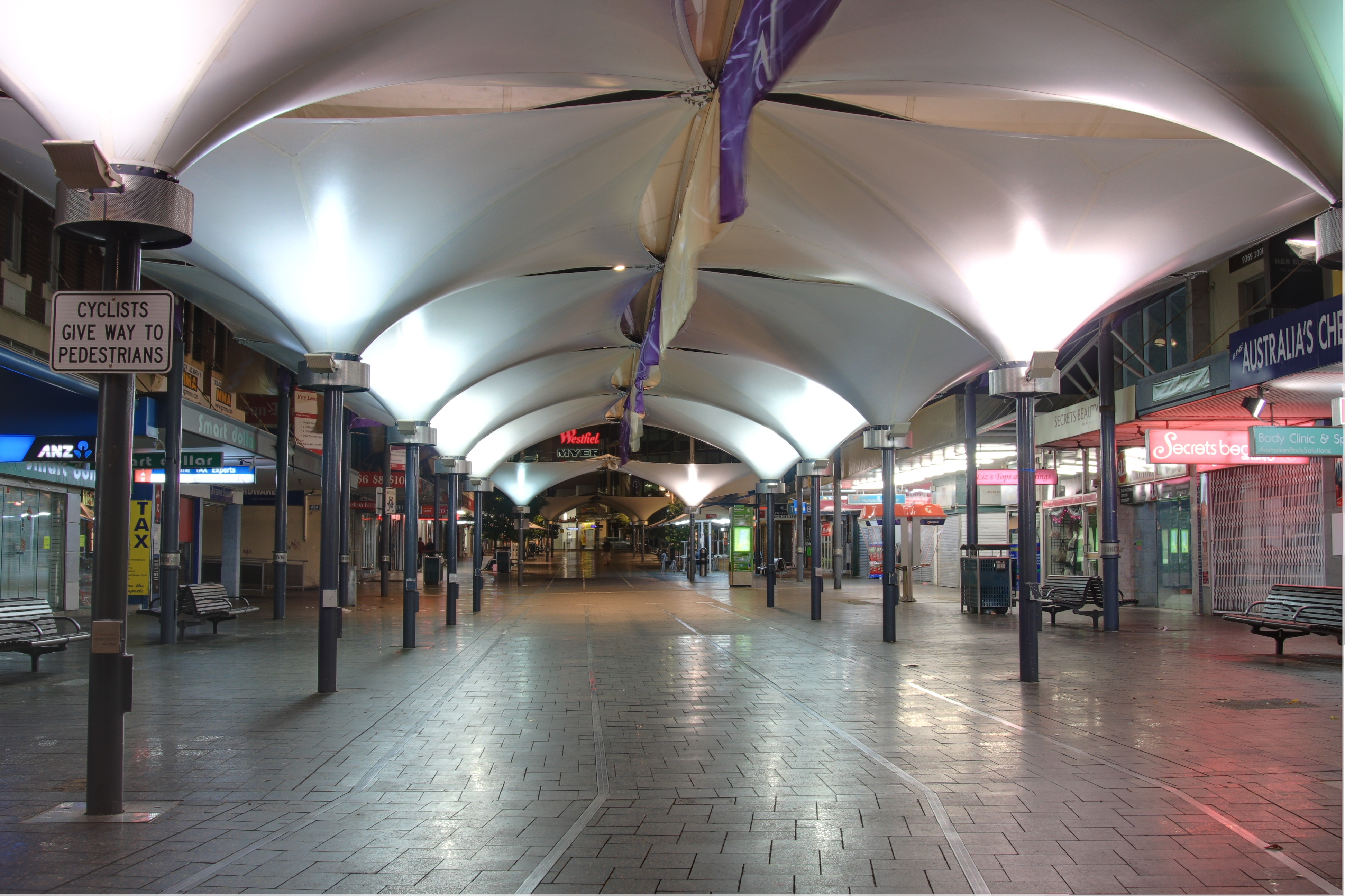 Oxford street mall